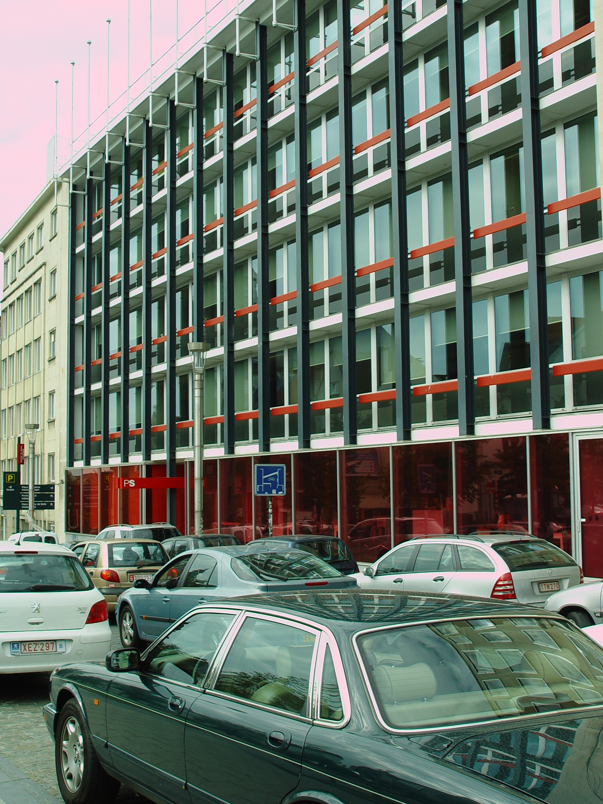 Siège du Parti Socialiste, bd de l'Empereur. Architecte : Maxime Brunfaut (1909-2003).